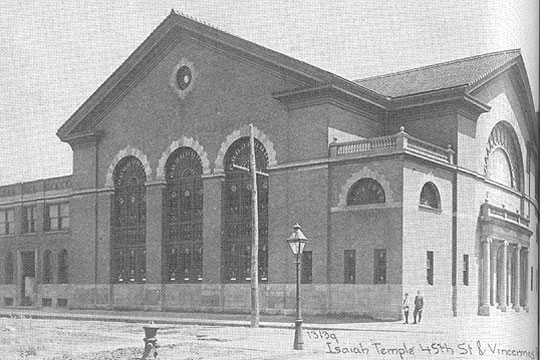 Temple Isaiah, 4501 S. Vincennes Avenue, Chicago, c. 1910.